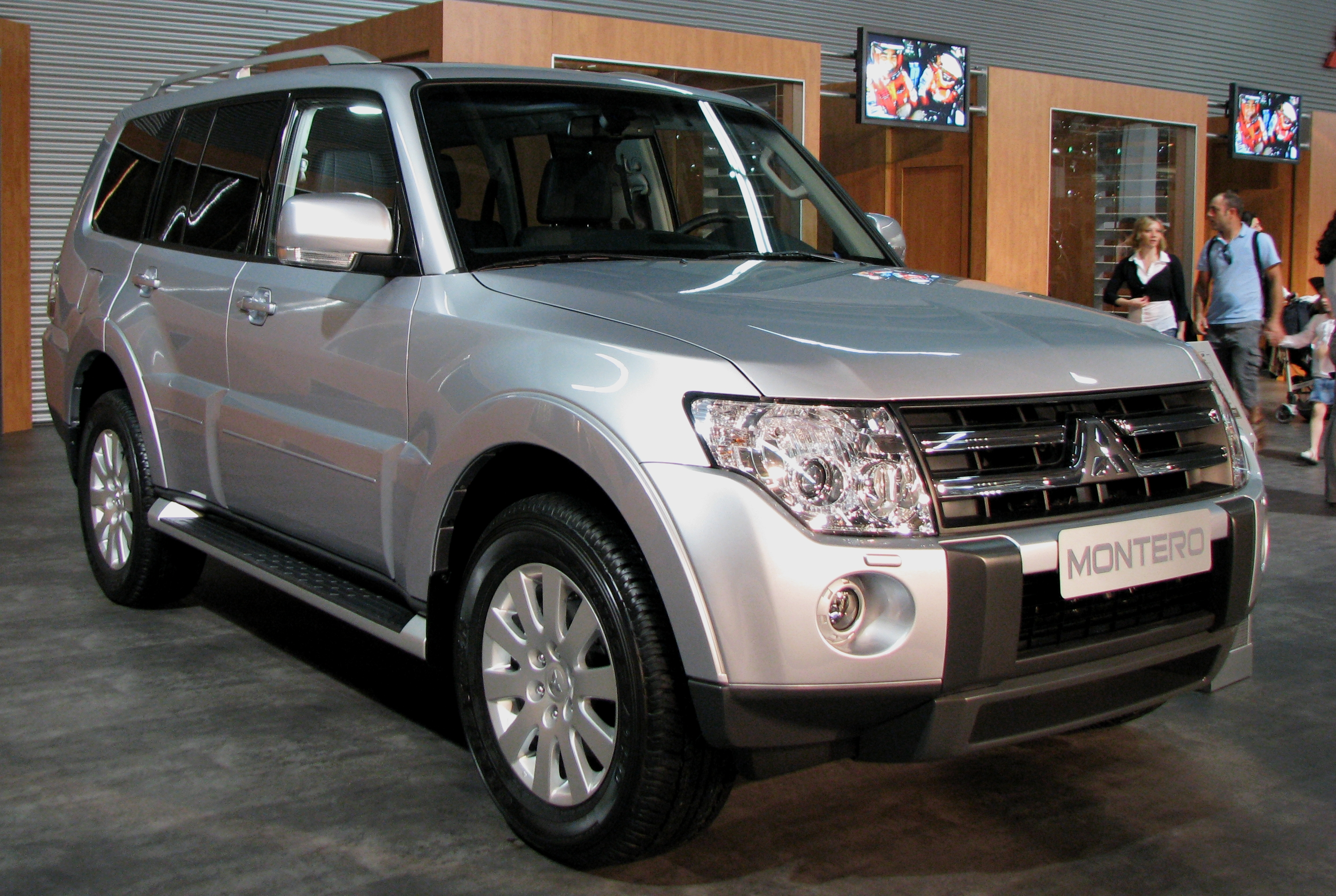 Mitsubishi Montero 4 generación en el Salón Internacional del Automóvil de Barcelona 2009.